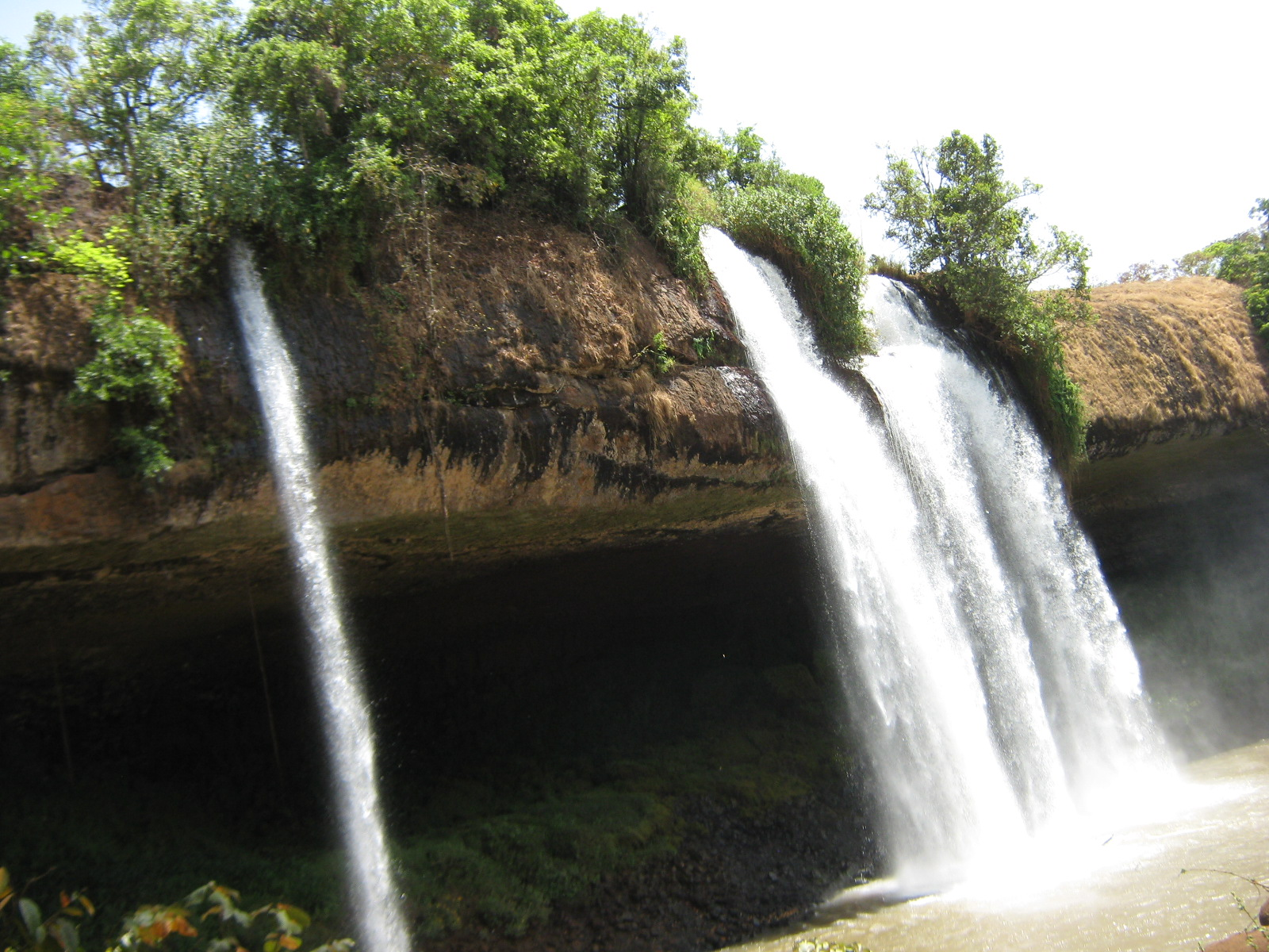 La chutes de Tello située à 50Km de Ngaoundéré dans la région de l'Adamaoua